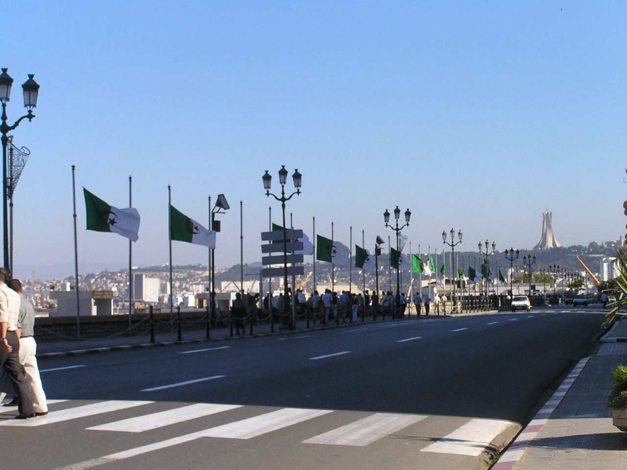 Sea side, Algeri, Algeria2005-08-03_17h42_57